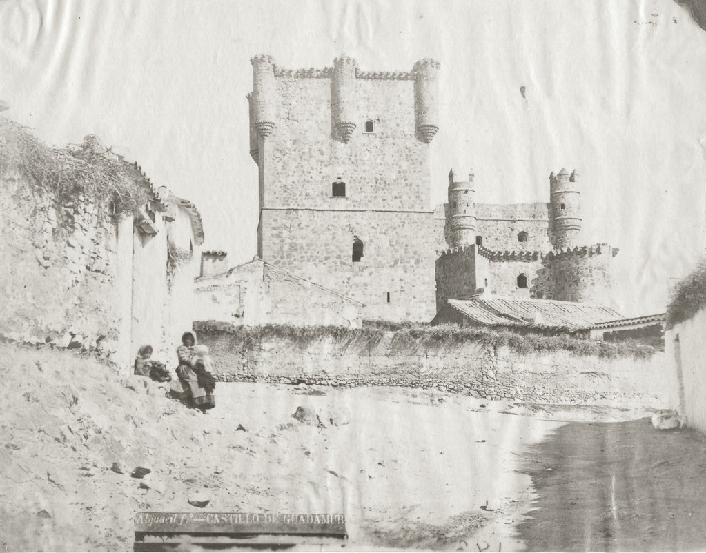 Vista del castillo de Guadamur (Toledo) desde la costanilla de la Natividad, hacia 1875. Obra de Casiano Alguacil.